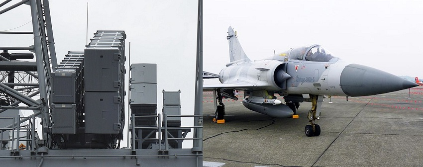 左侧图片为2019年中華民國海軍敦睦遠航訓練支隊訪問基隆，田單軍艦甲板中部的雄風二型與雄風三型反艦飛彈發射箱。右侧图片为2011年中華民國空軍岡山基地營區開放開放活動时拍摄的幻象2000-5EI2037戰鬥機。